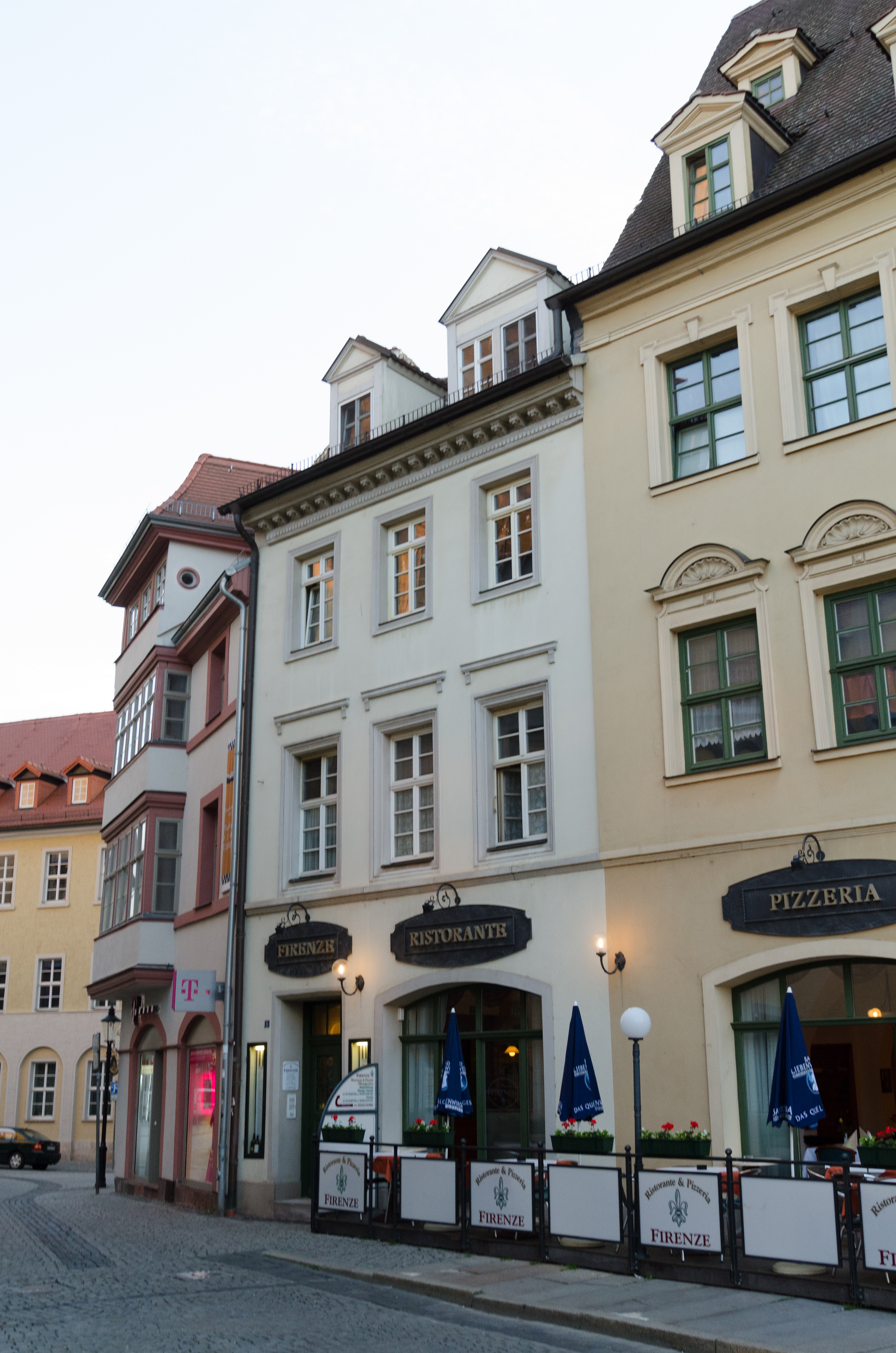 Naumburg, Markt 5